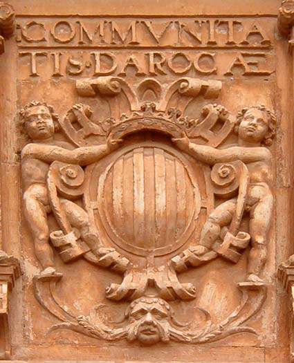 Escudo en la fachada del Convento de San Valentín (Báguena, provincia de Teruel, España)